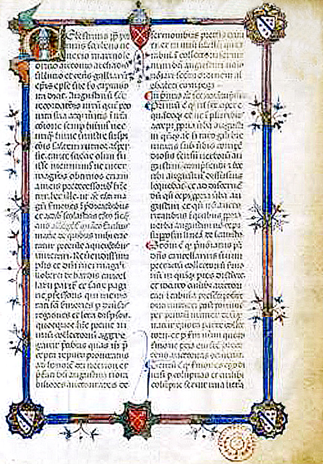 Manuscrit ornés aux armes de Grégoire XI